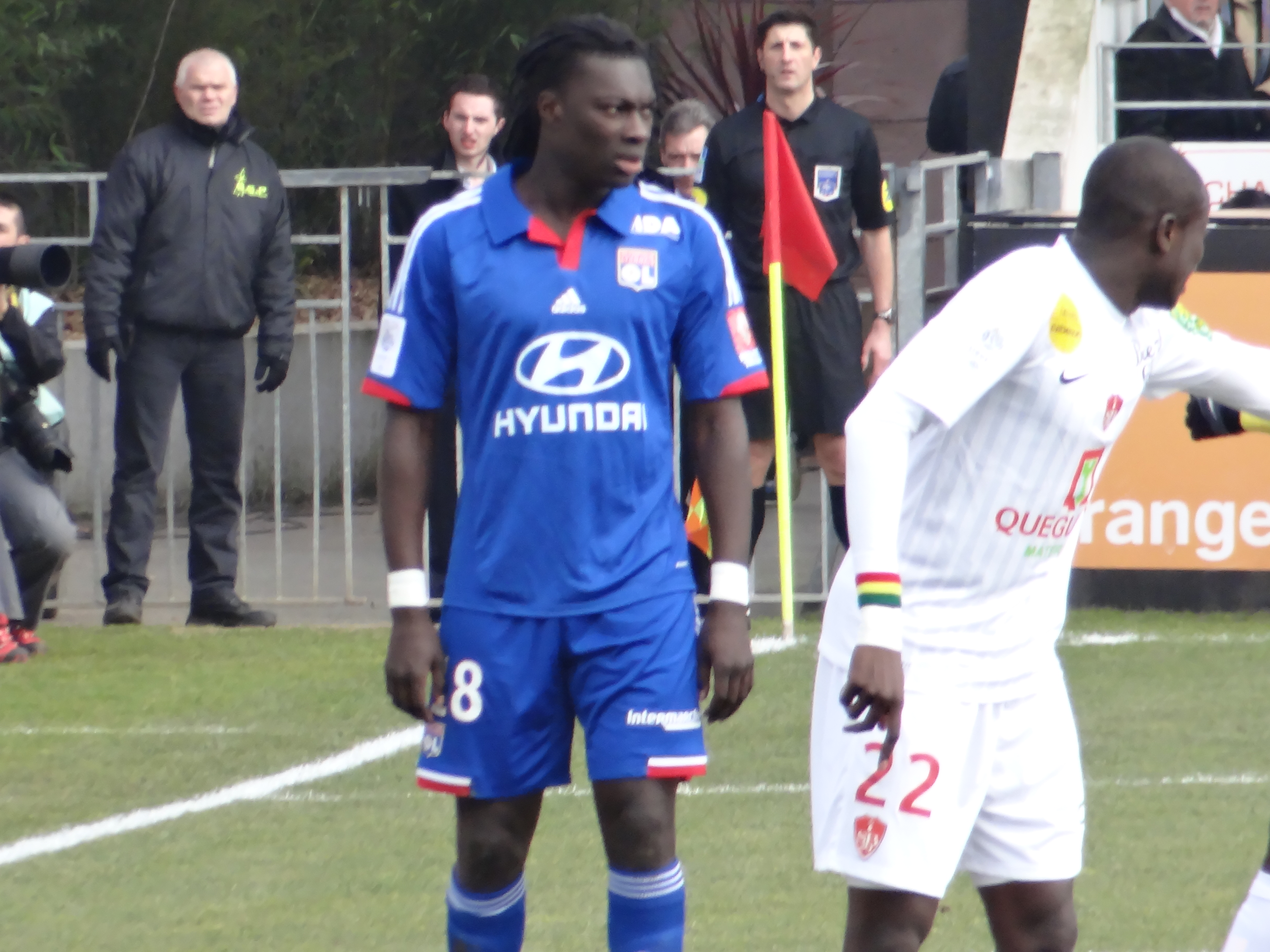 Match de football (Ligue 1) entre le Stade brestois 29 et l'Olympique lyonnais, le 3 mars 2013